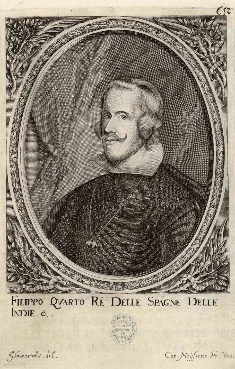 Felipe IV rey de España, ilustración de Historia di Leopoldo Cesare, Continente le cose piú memorabili successe in Europa dal 1656 al 1670 de Galeazo Gualdo Priorato, Viena, 1670.